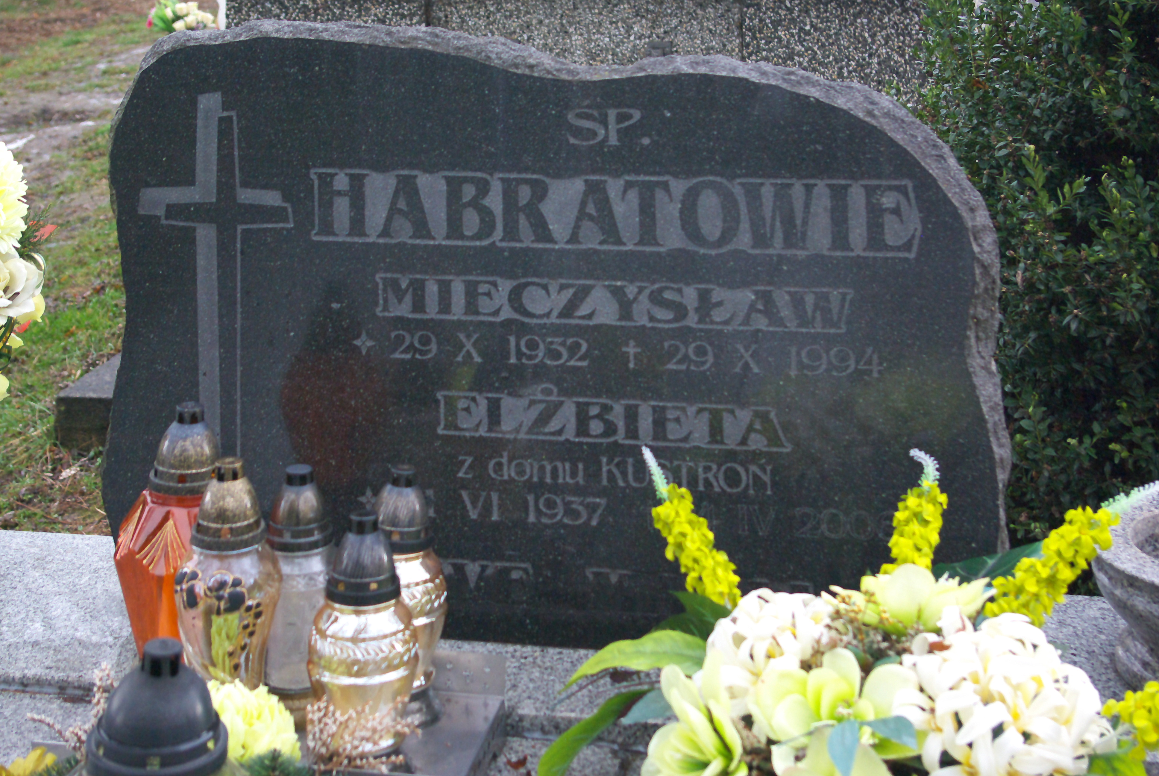 Grobowiec Elżbiety i Mieczysława Habratów w części „Matejki Stary” Cmentarza Centralnego w Sanoku.